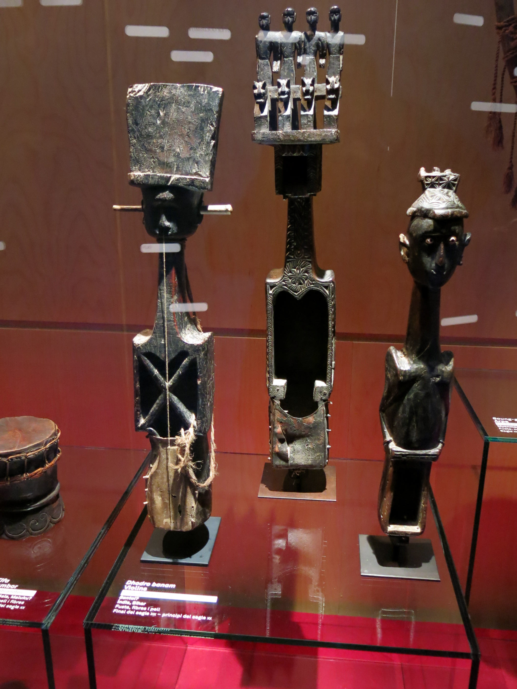 Dhodro banan (violins), India, Bihar. "Escultures sonores", exhibit at Museu de la Múscia de Barcelona.